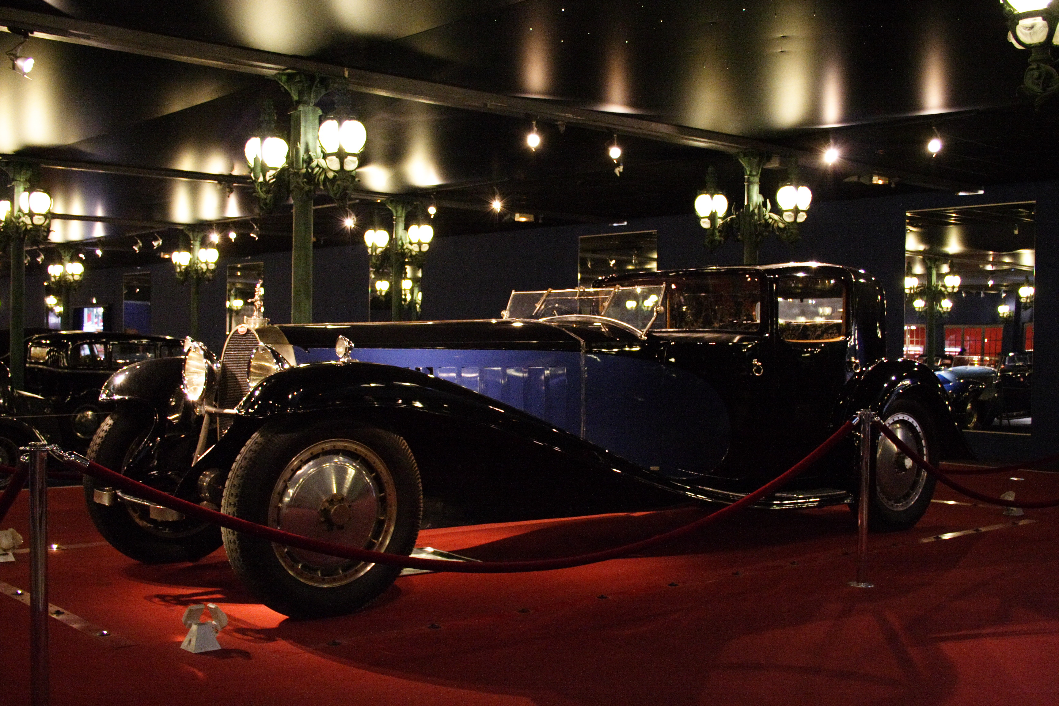 Bugatti Coupé Type 41 1929 at the Musée National de l'Automobil(Mulhouse, France)